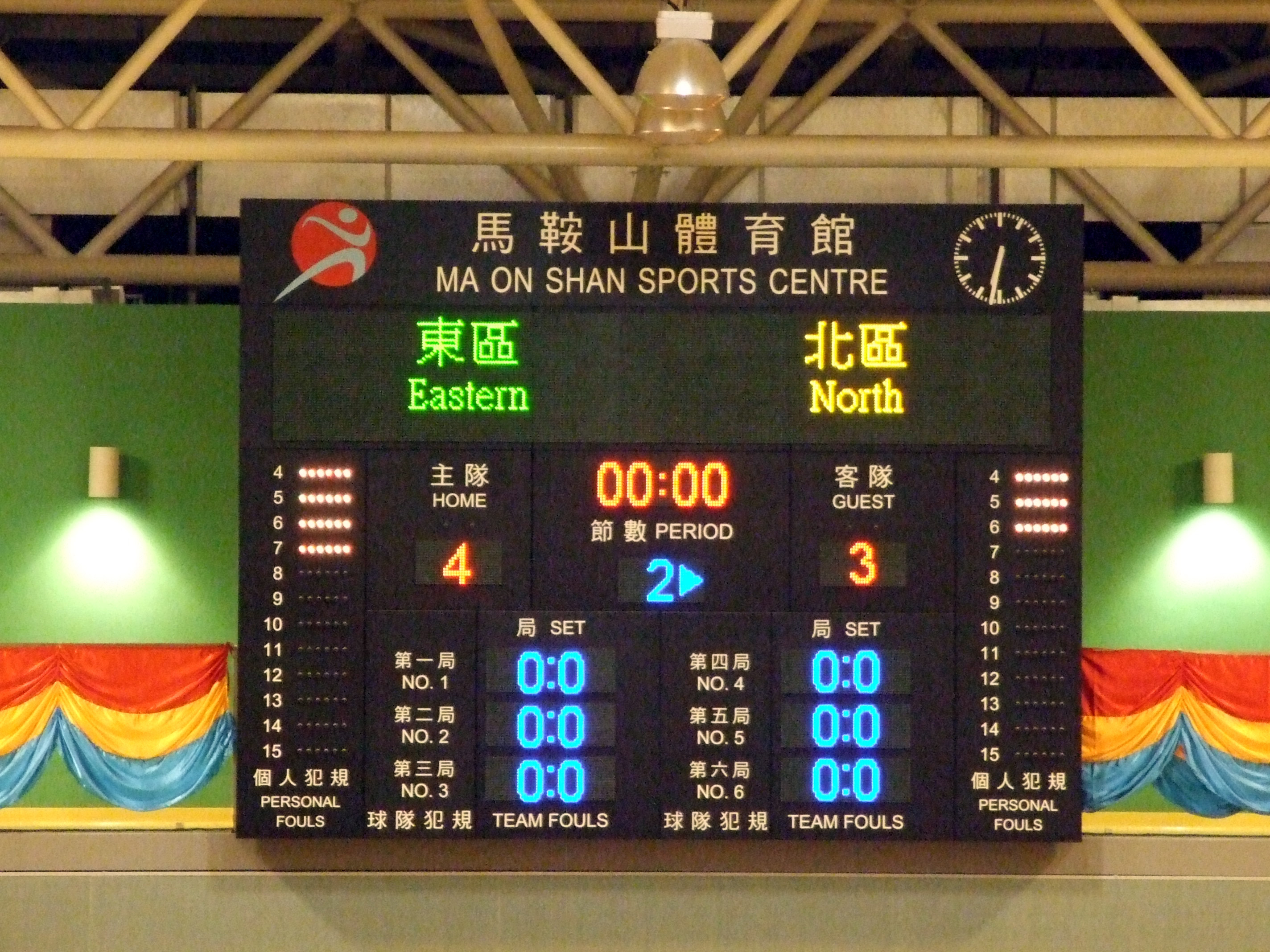 中文（香港）: 2011年全港運動會五人足球比賽決賽最終比數東區4-3僅勝北區